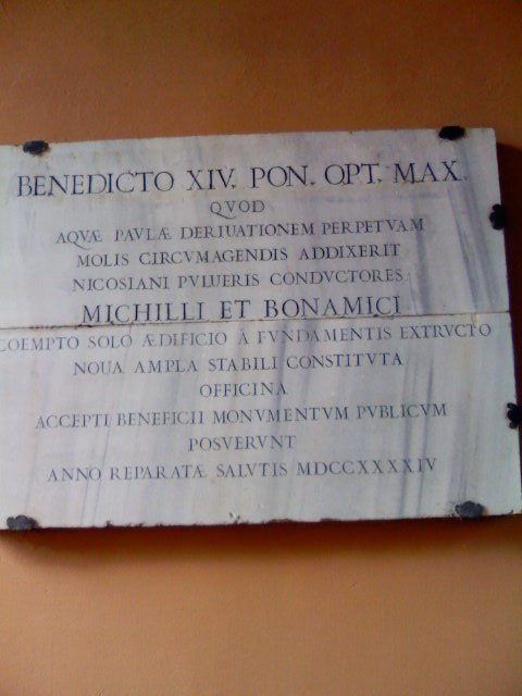 Targa orizzontale